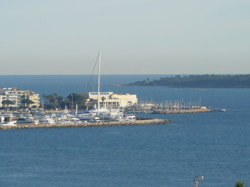 Le Palm Beach casino de Cannes vu depuis la tour de la Castre au Suquet